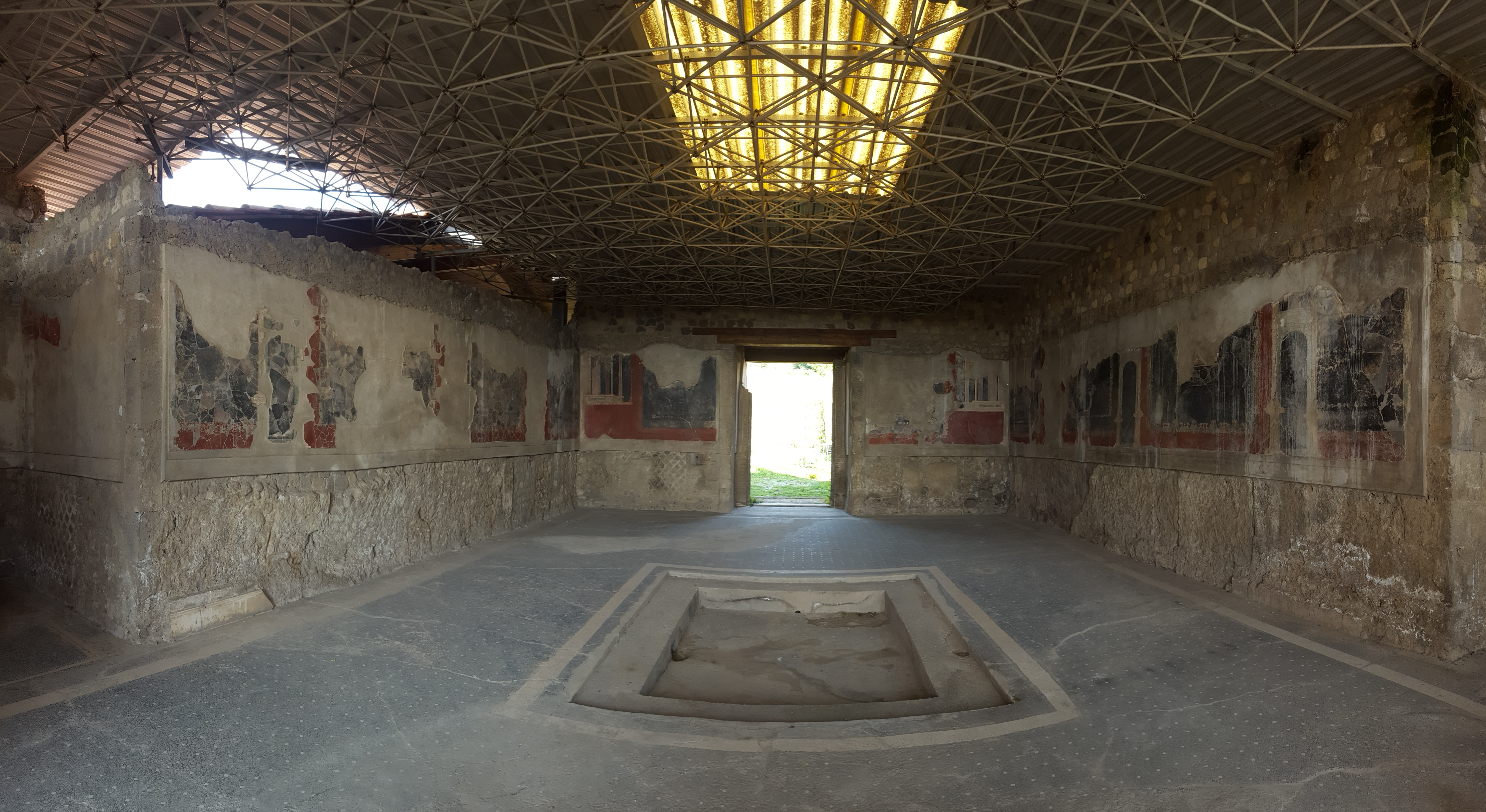 Villa Arianna This is a photo of a monument which is part of cultural heritage of Italy.